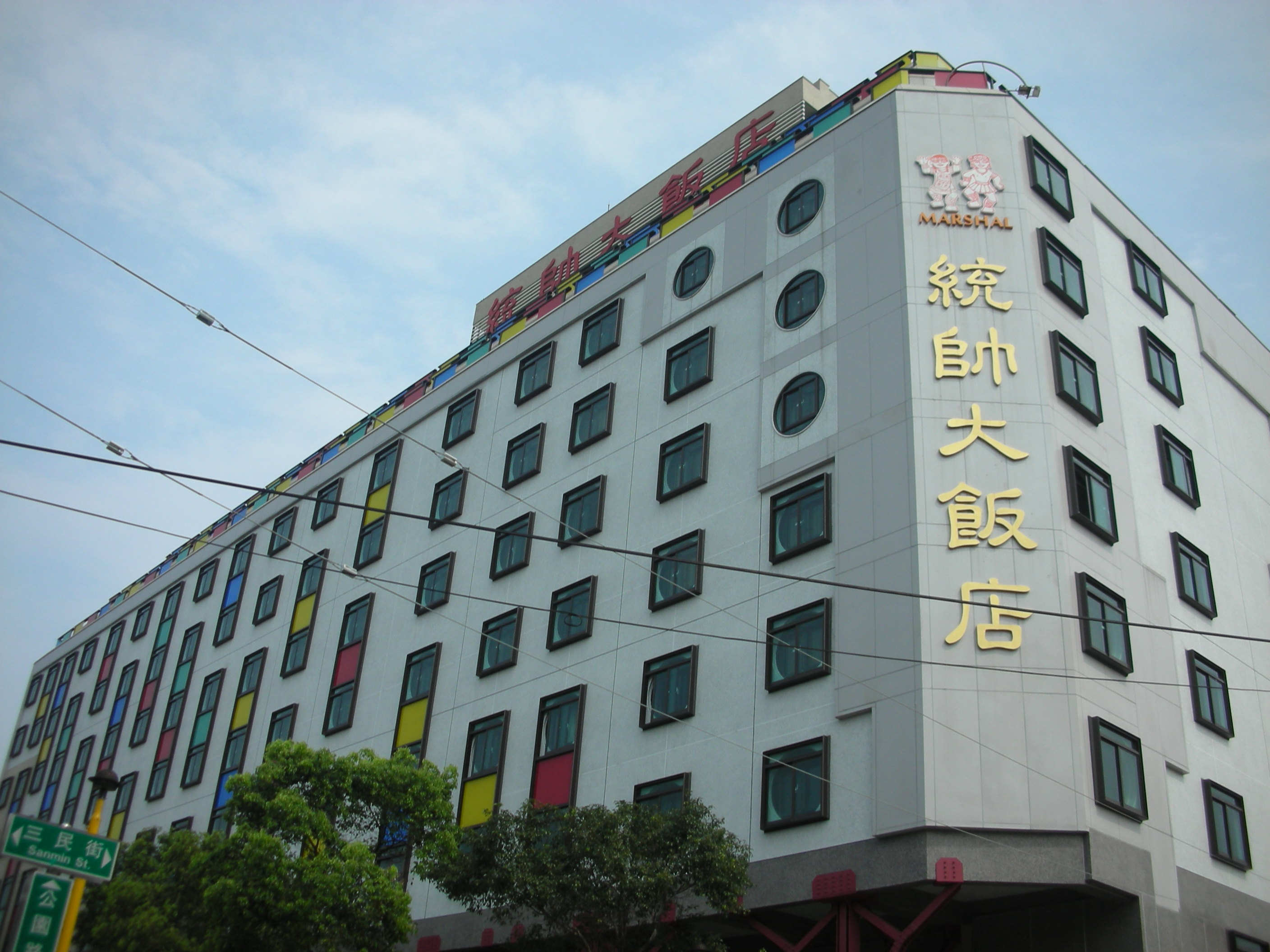 統帥大飯店，位於花蓮縣花蓮市公園路36號，2018年2月6日因地震倒塌，2018年2月9日拆除。